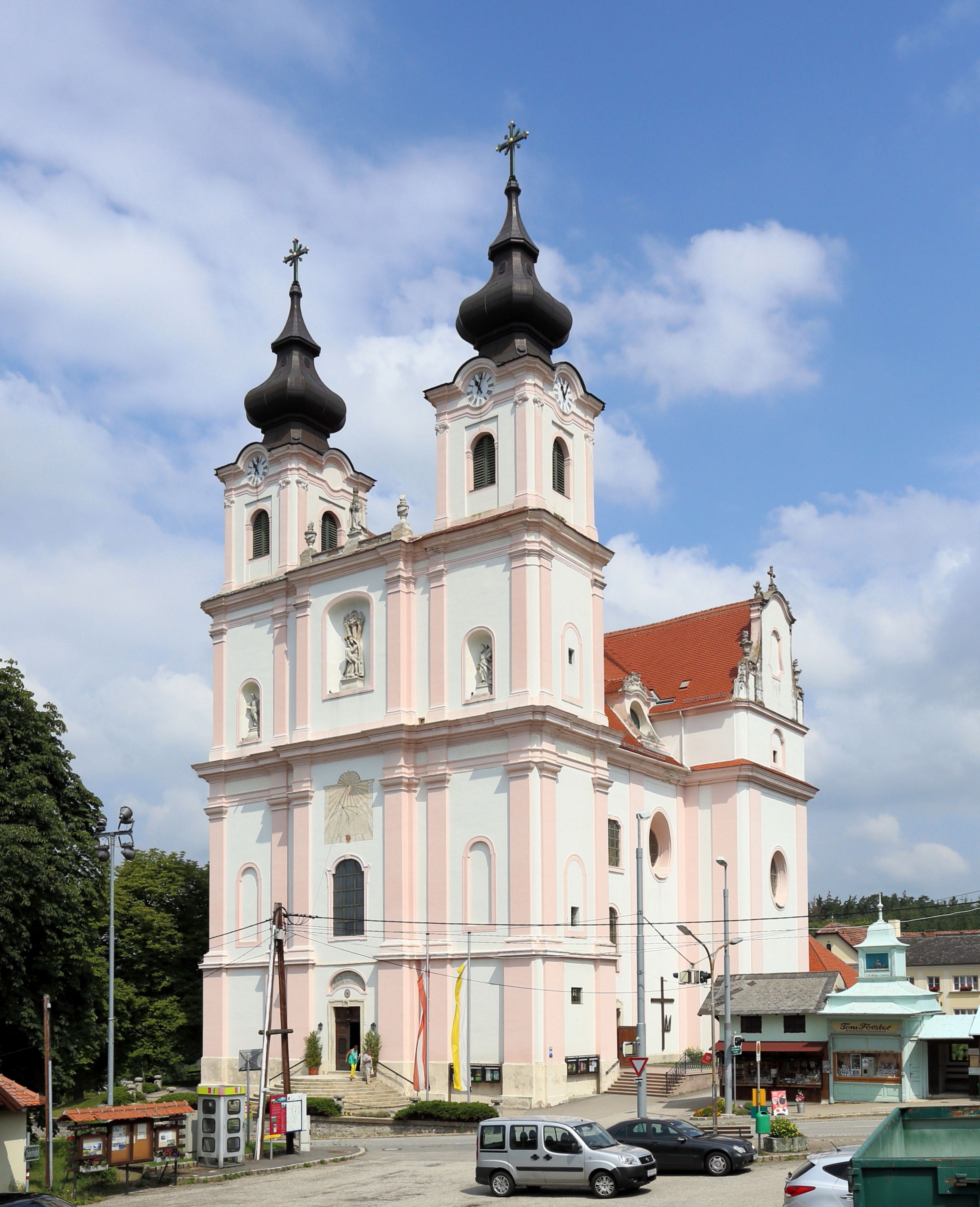 Die Wallfahrtskirche Zur schmerzhaften Gottesmutter in Maria Dreieichen, ein Ortsteil der niederösterreichischen Gemeinde Rosenburg-Mold.